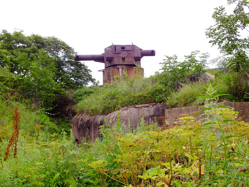 Форт № 10 (Приморский край, Владивосток, о. Русский, 1, 7 км северо-восточнее перешейка о. Шкота, высота 172, 4, вершина, склоны высоты)